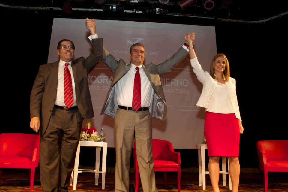 Candidatos a presidencia y vicepresidencias de la República de Costa Rica por el partido Movimiento Libertario, 2014